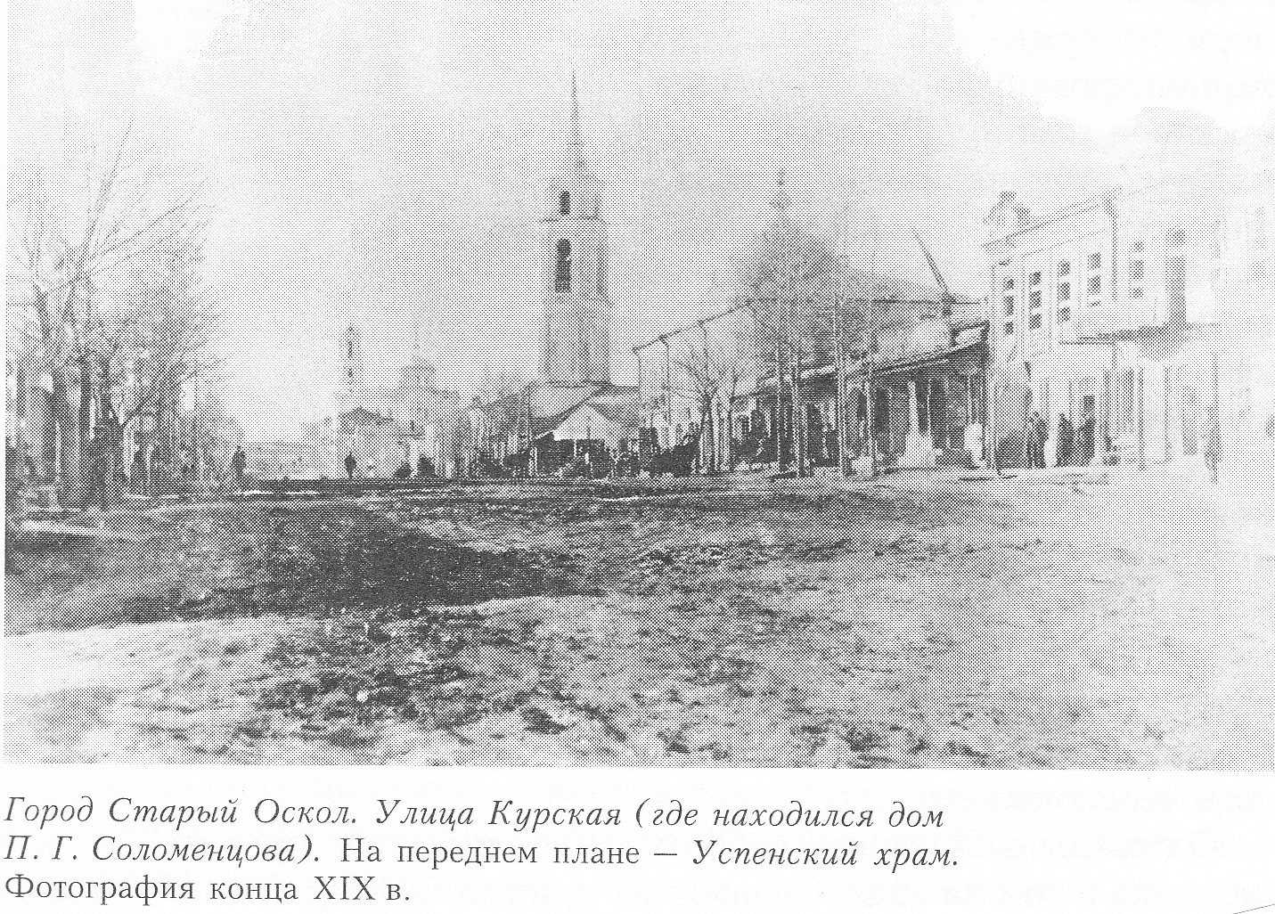 Файл сделан с общедоступной фотографии